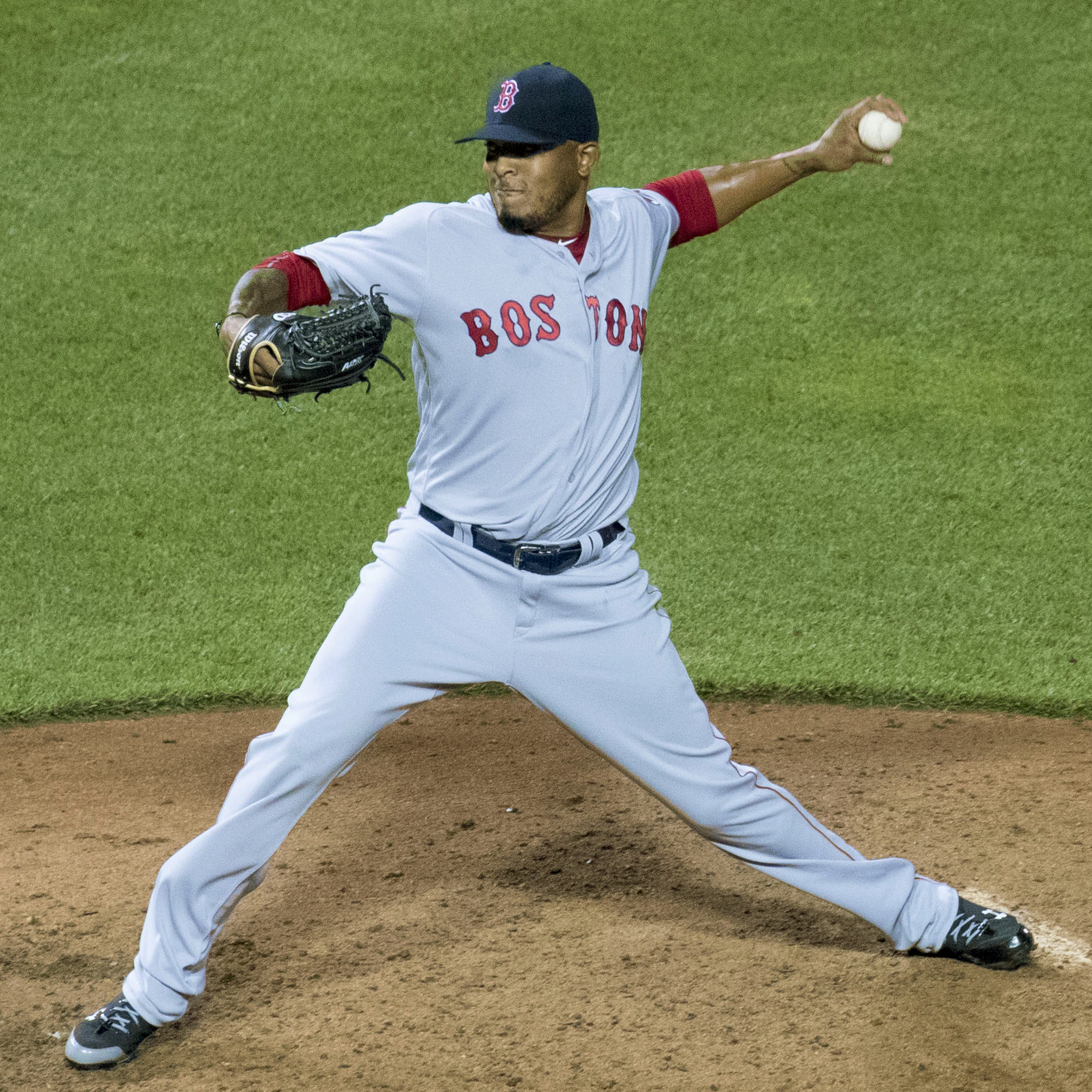 Fernando Abad